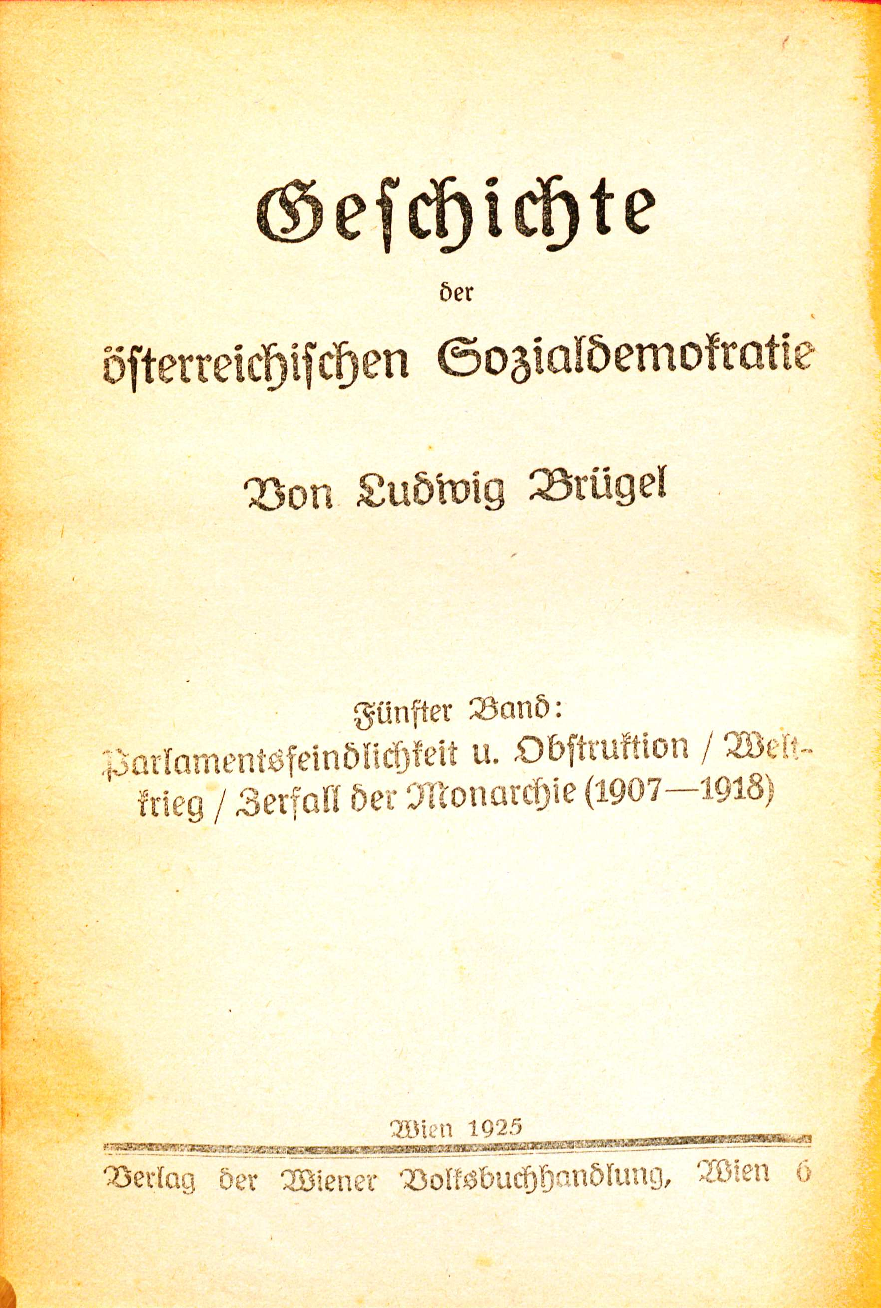 Ludwig Brügel Geschichte der österreichischen Sozialdemokratie. 5. Parlamentsfeindlichkeit und Obstruktion ; Weltkrieg ; Zerfall der Monarchie : (1907 - 1918), 1925 Titel